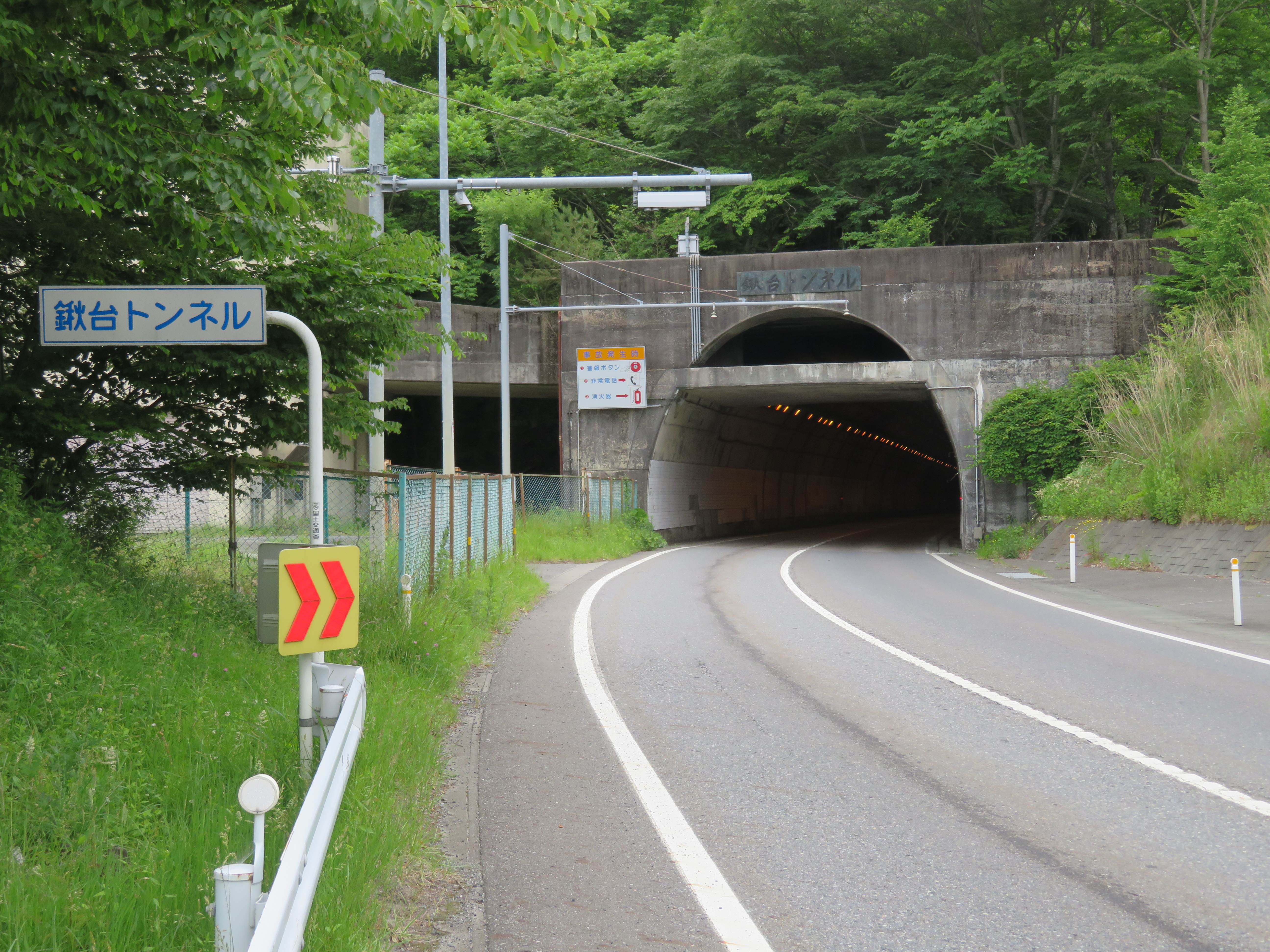 国道45号線鍬台トンネル（宮古方面側坑口） Canon PowerShot SX720 HS